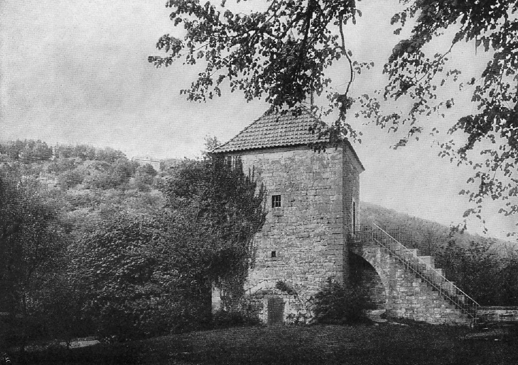 Originalbeschreibung „Turm der Schaumburg gegen die Paschenburg“. – Deckbergen, Rinteln, Niedersachsen, Deutschland.